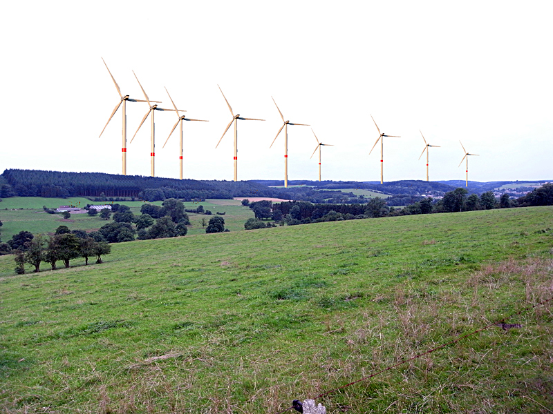 Projet d'éoliennes vues de la route Tellin/Bure (Belgique)